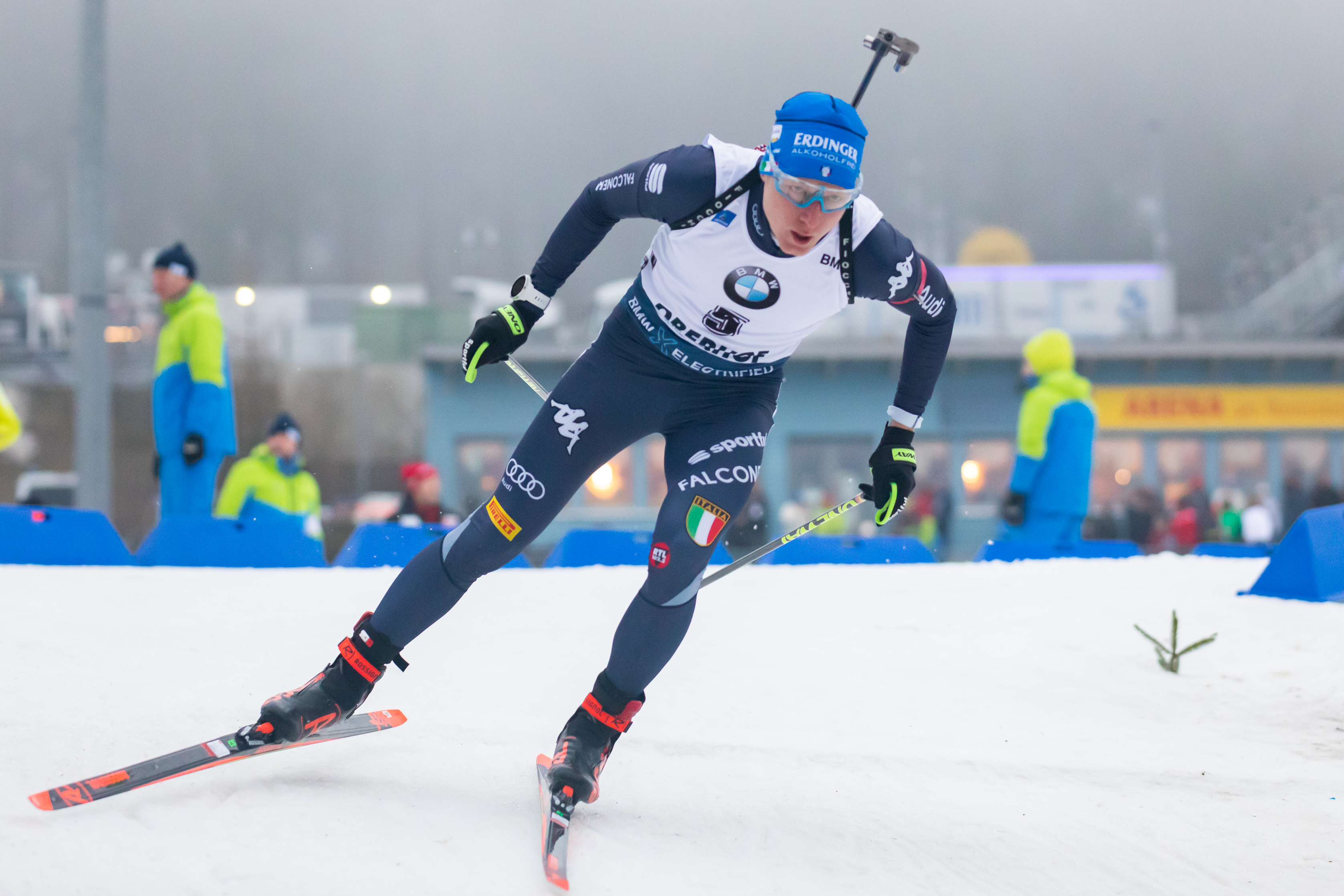 IBU World Cup Biathlon Oberhof; Lukas Hofer (ITA, Italien)